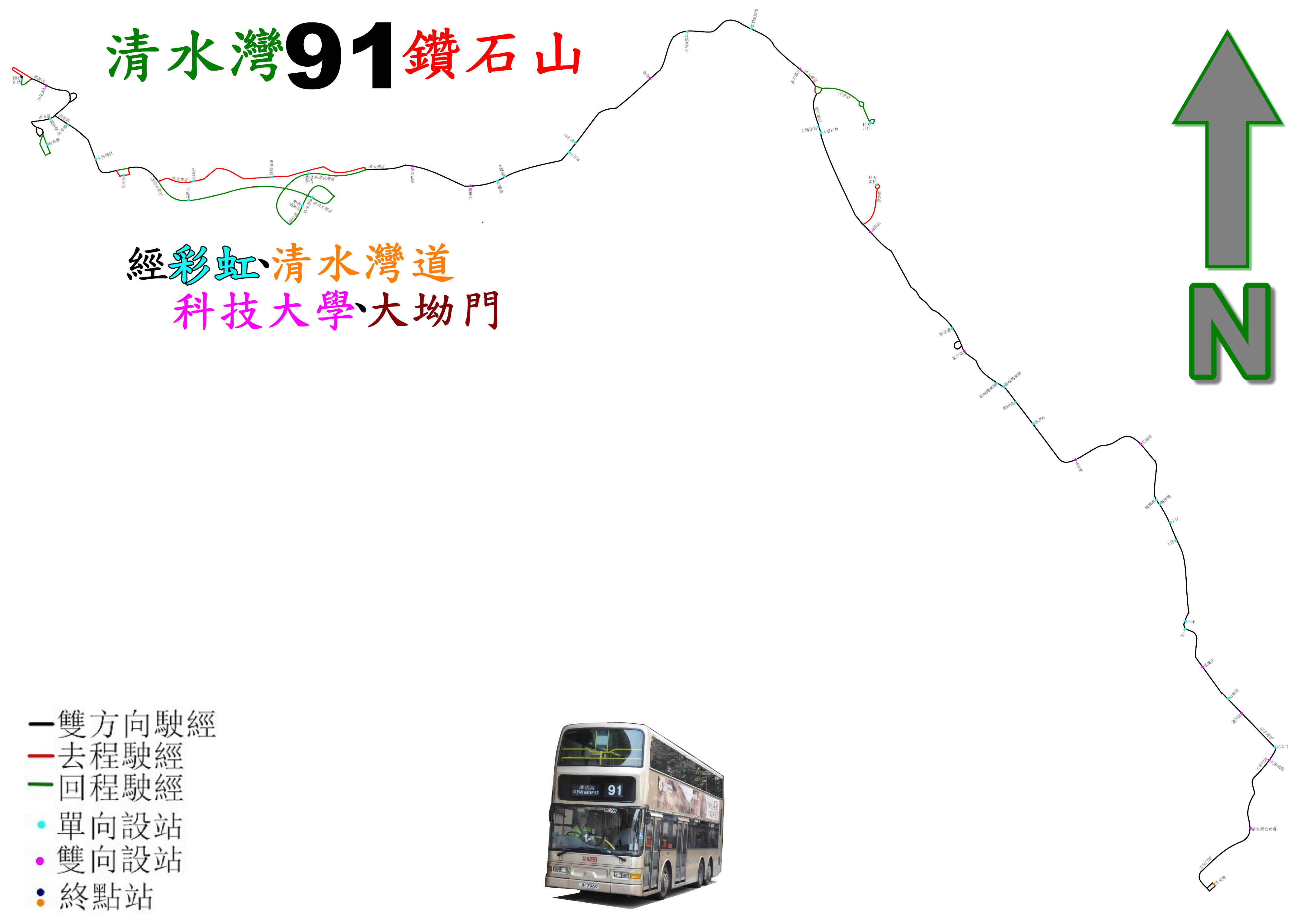 中文（香港）: 九巴91線的走線圖